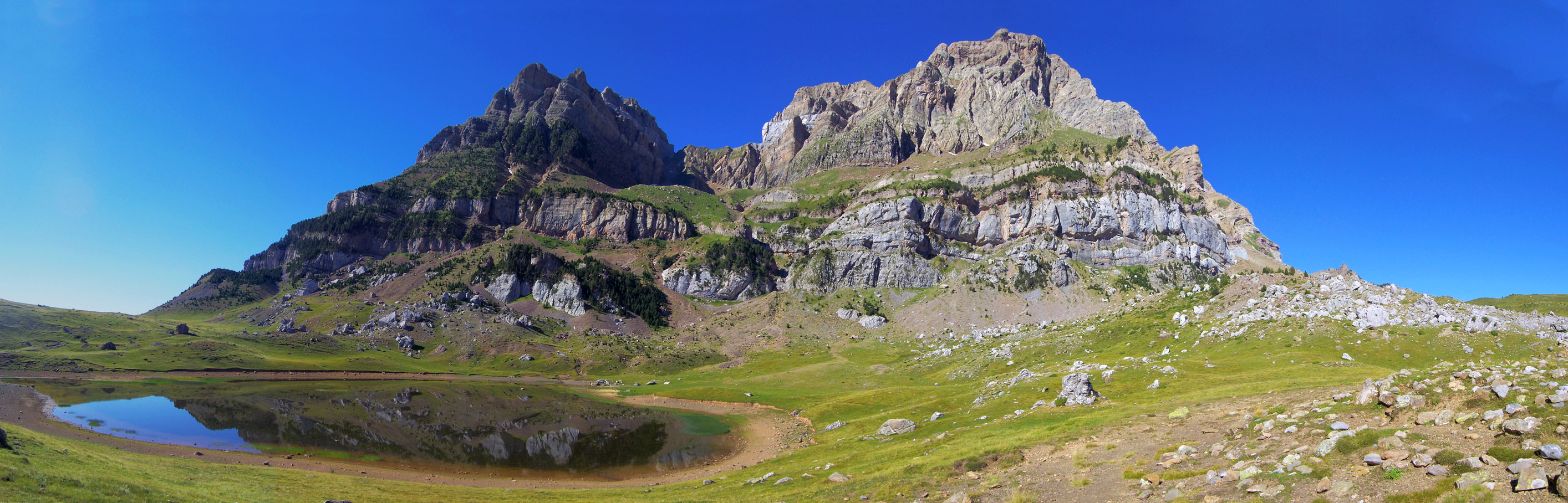 Panorámica de Peña Telera, Peña Parda (o Peña de Cachivirizas) y Corona del Mallo (o Peña Blanca) desde el Ibón de Piedrafita. Piedrafita de Jaca (Huesca). Pirineo Aragonés.